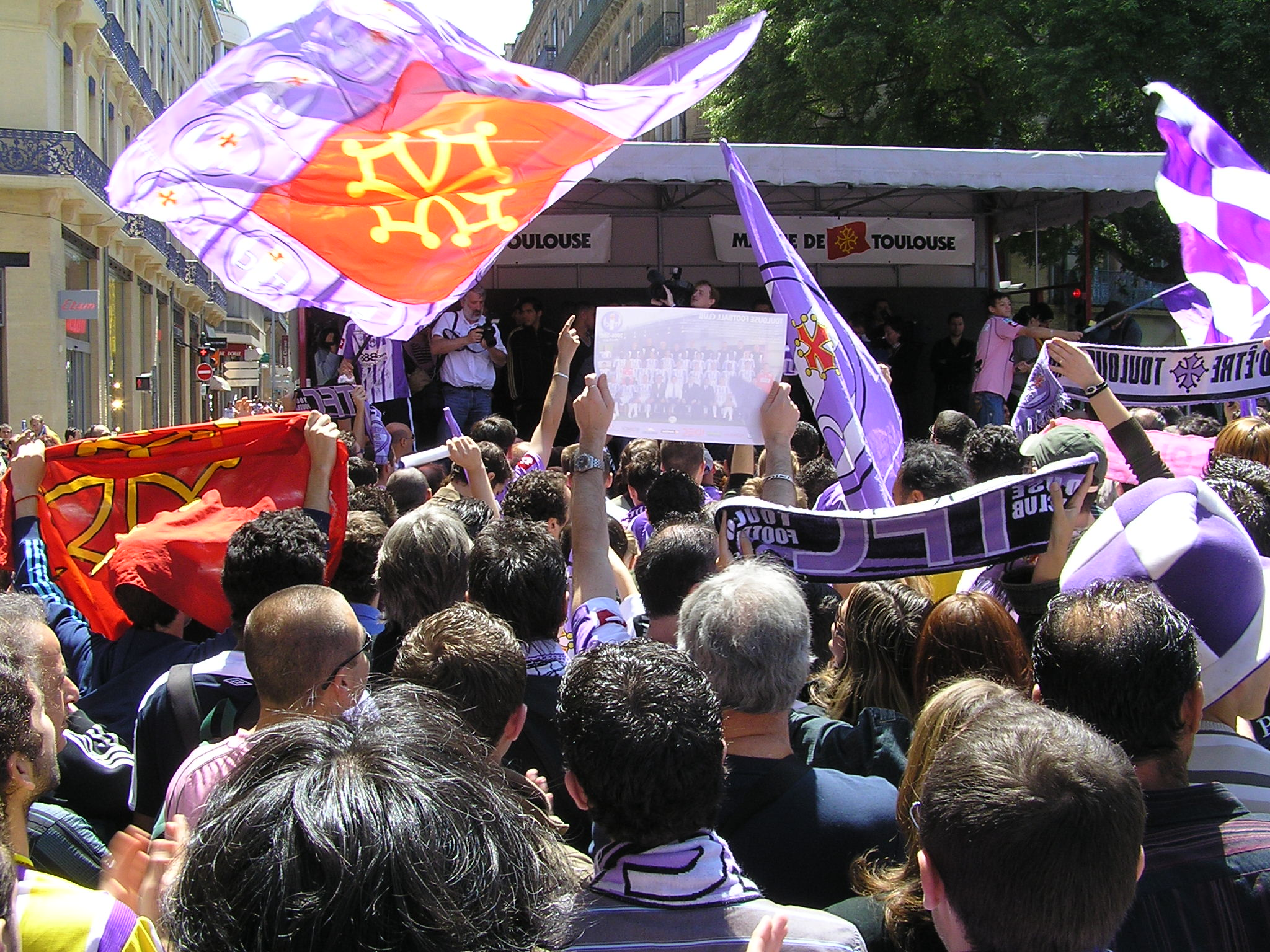 Toulouse fête la qualification du Téfécé pour la Ligue des Champions 2007-08